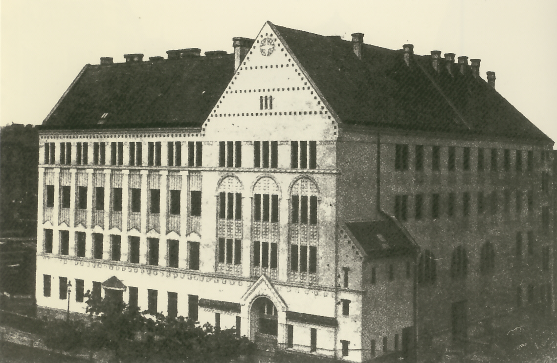 Kirche zur hl. Philomena (heute Dreifaltigkeitskirche), um 1915, Alxingergasse 6, Wien-Favoriten